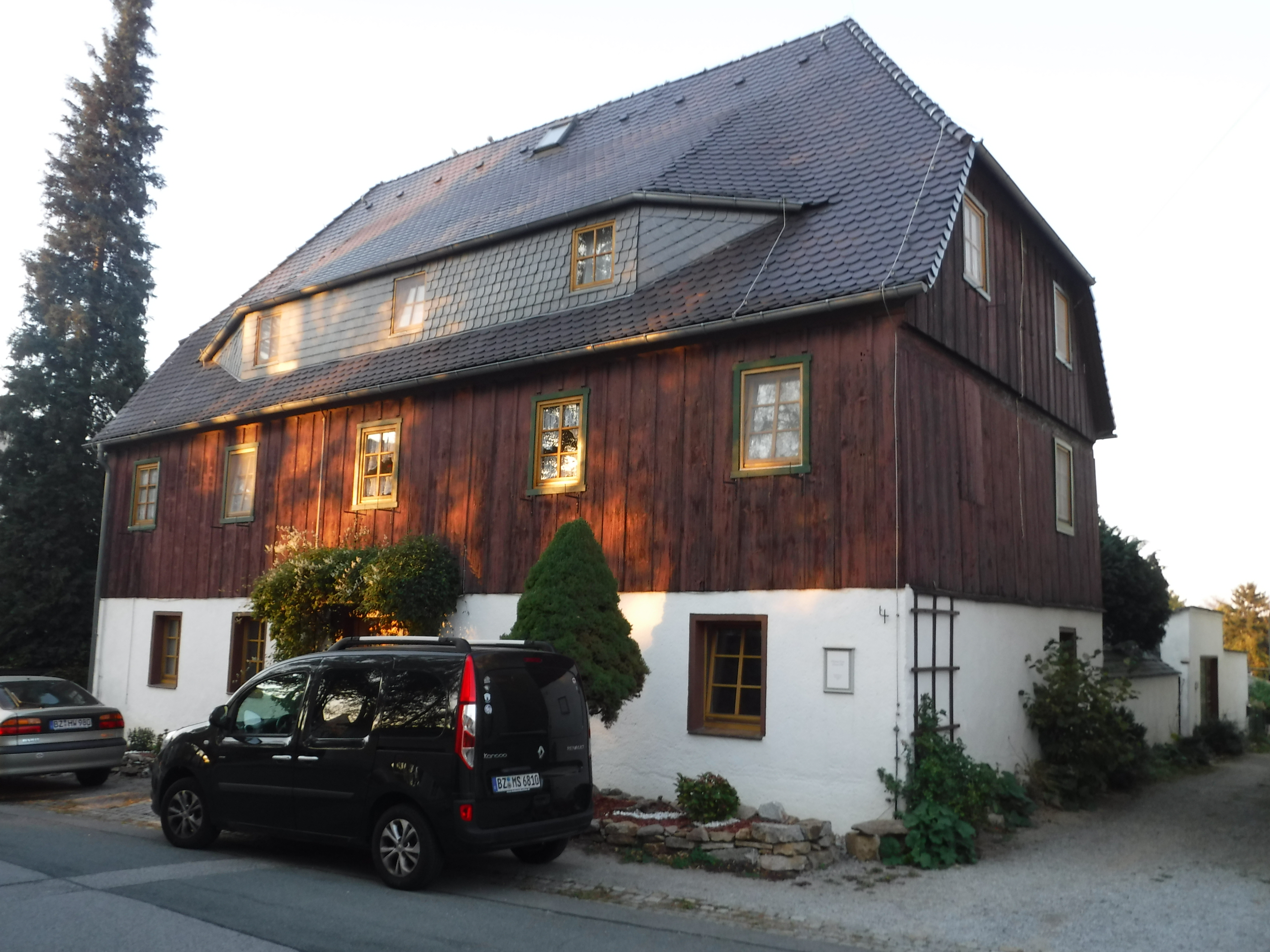 Zinzendorfplatz 4: Wohnhaus, ohne Anbauten 1752 Einzeldenkmal der Sachgesamtheit Kolonie Kleinwelka; Obergeschoss und Giebel Fachwerk verbrettert, baugeschichtlich und ortsbildprägend von Bedeutung. Steiles Krüppelwalmdach mit Hechtgaupe, Fenster in originaler Größe.